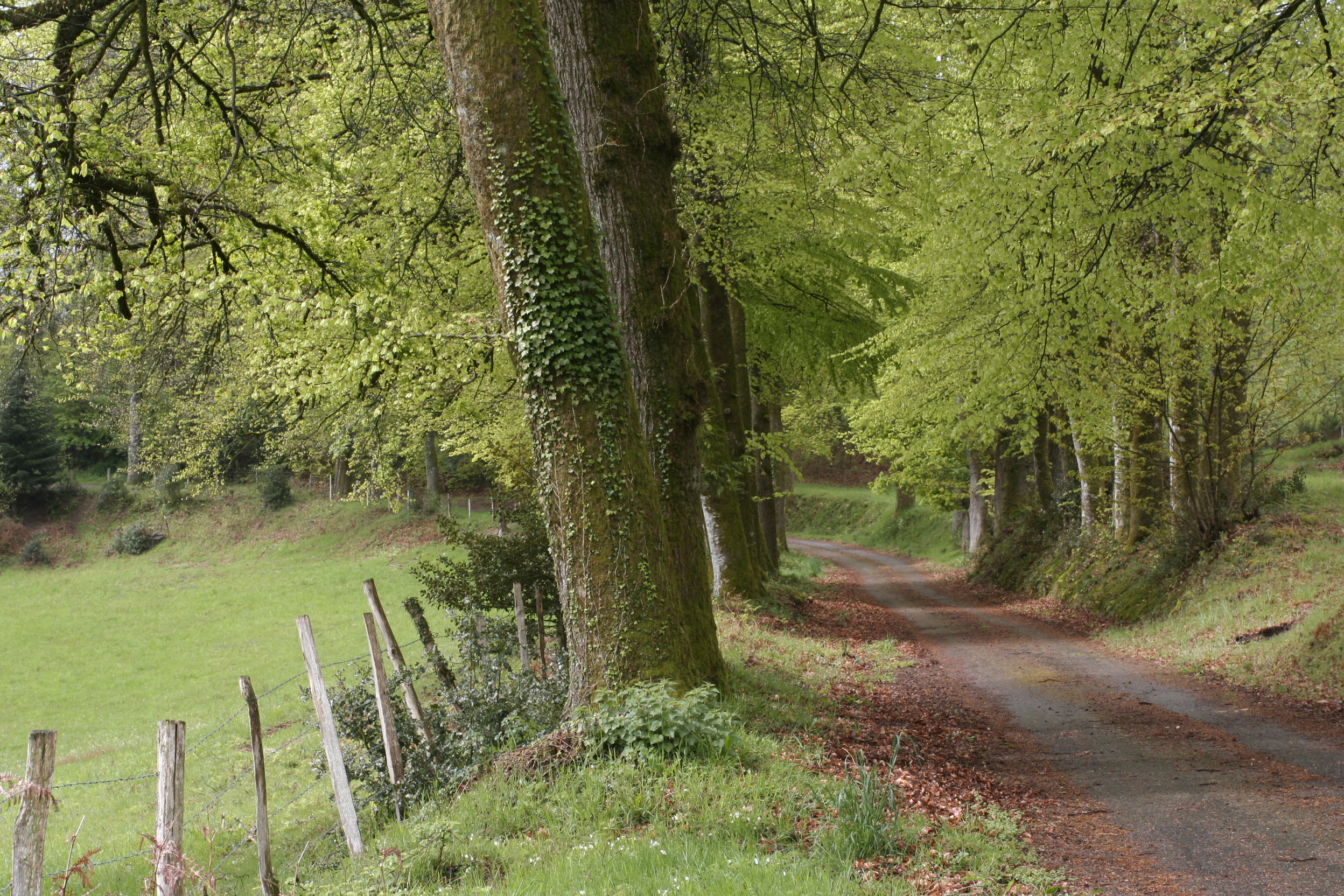 Allée du Chalet de Montméry